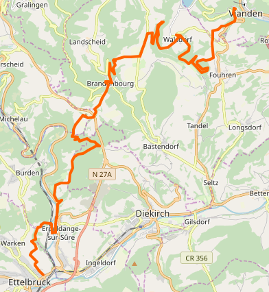 Streck vum Victor-Hugo-Pad